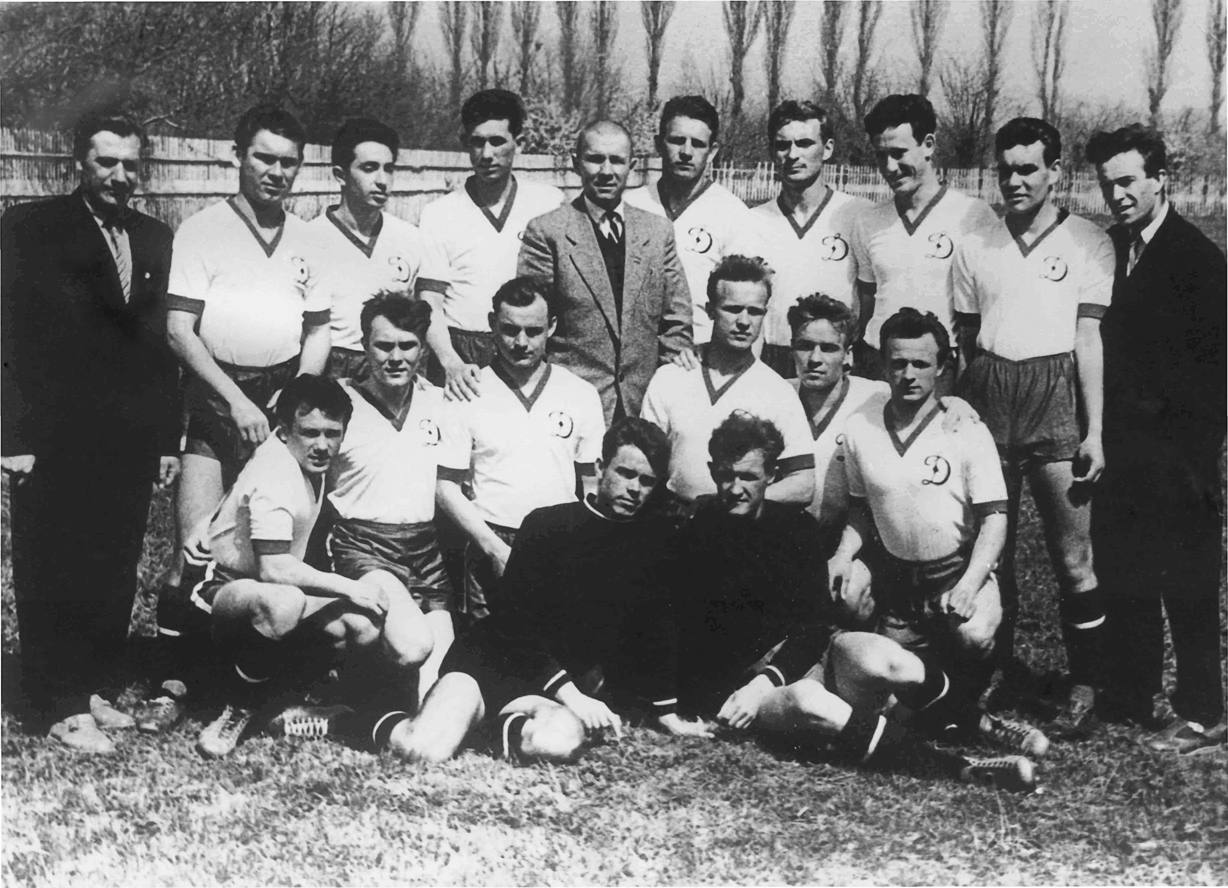 Групповая фотография футболистов брянского «Динамо» 1960-го года